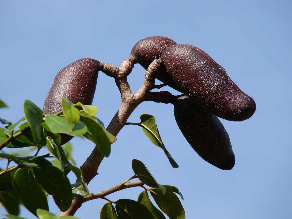 frutos do jatoba tirada em parque ceret sao paulo